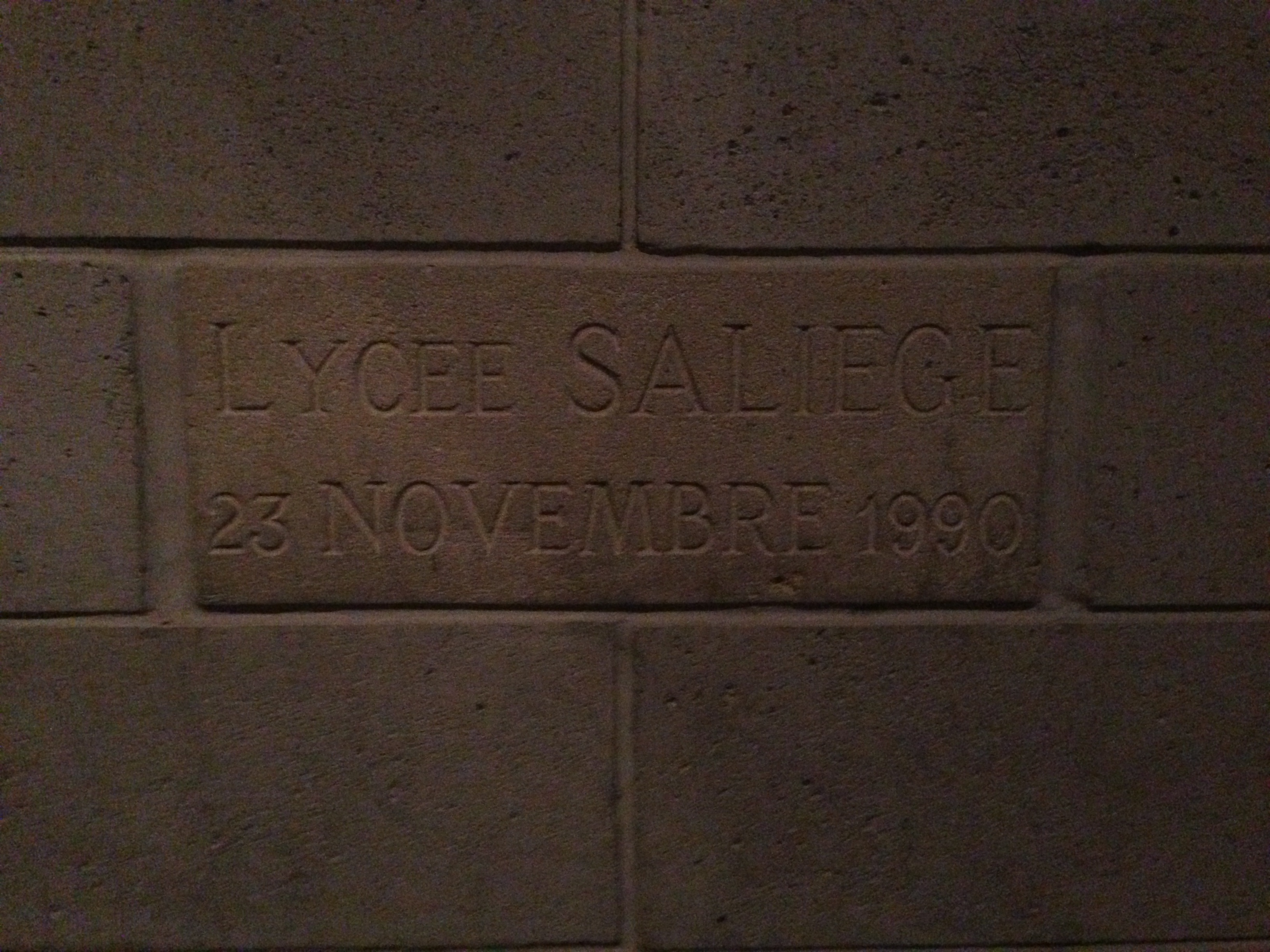 La première pierre symbolique du Lycée Saliége